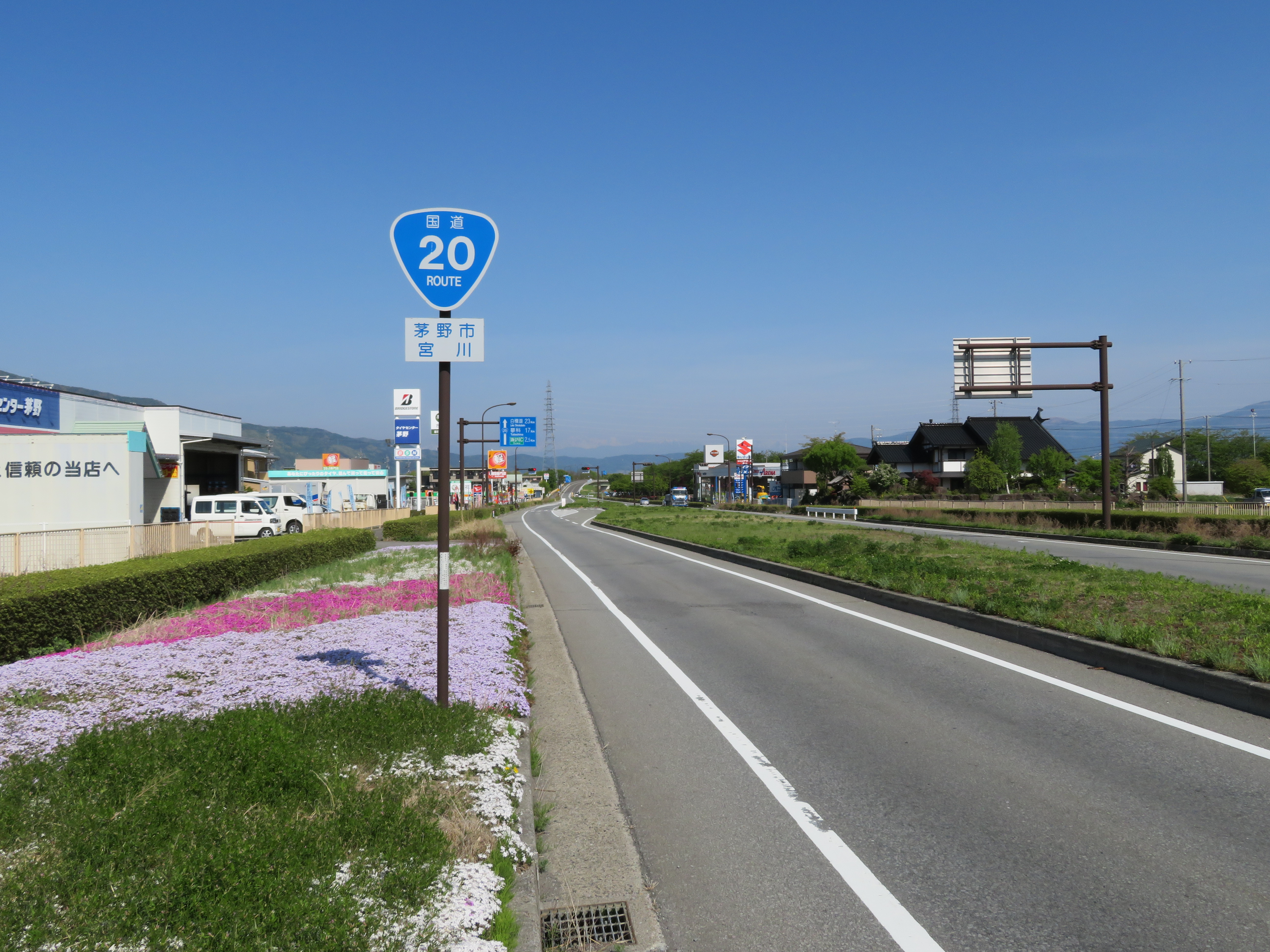 国道20号線諏訪バイパス長野県茅野市宮川付近（諏訪インター方面を撮影） Canon PowerShot SX720 HS